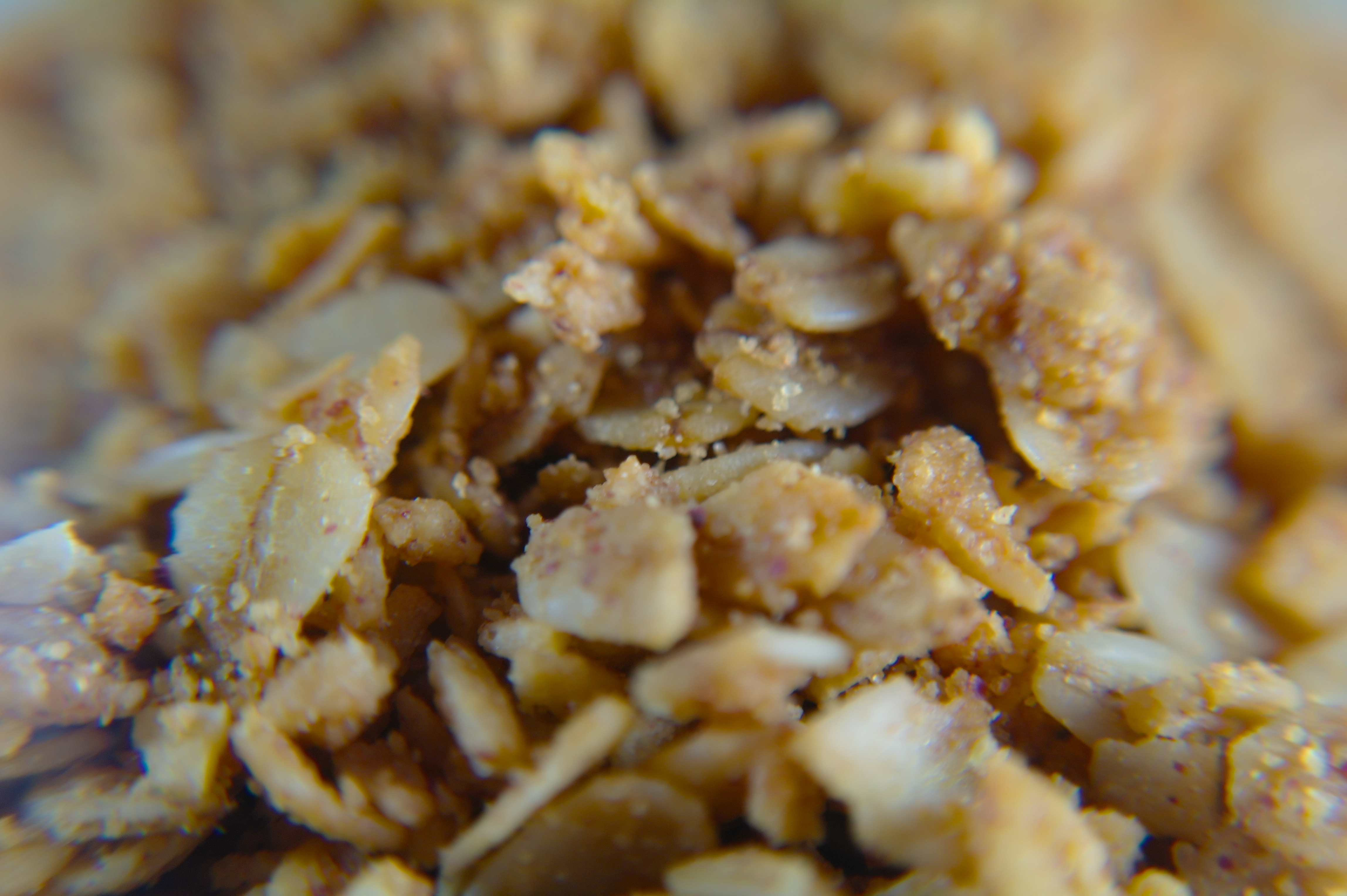 Granola